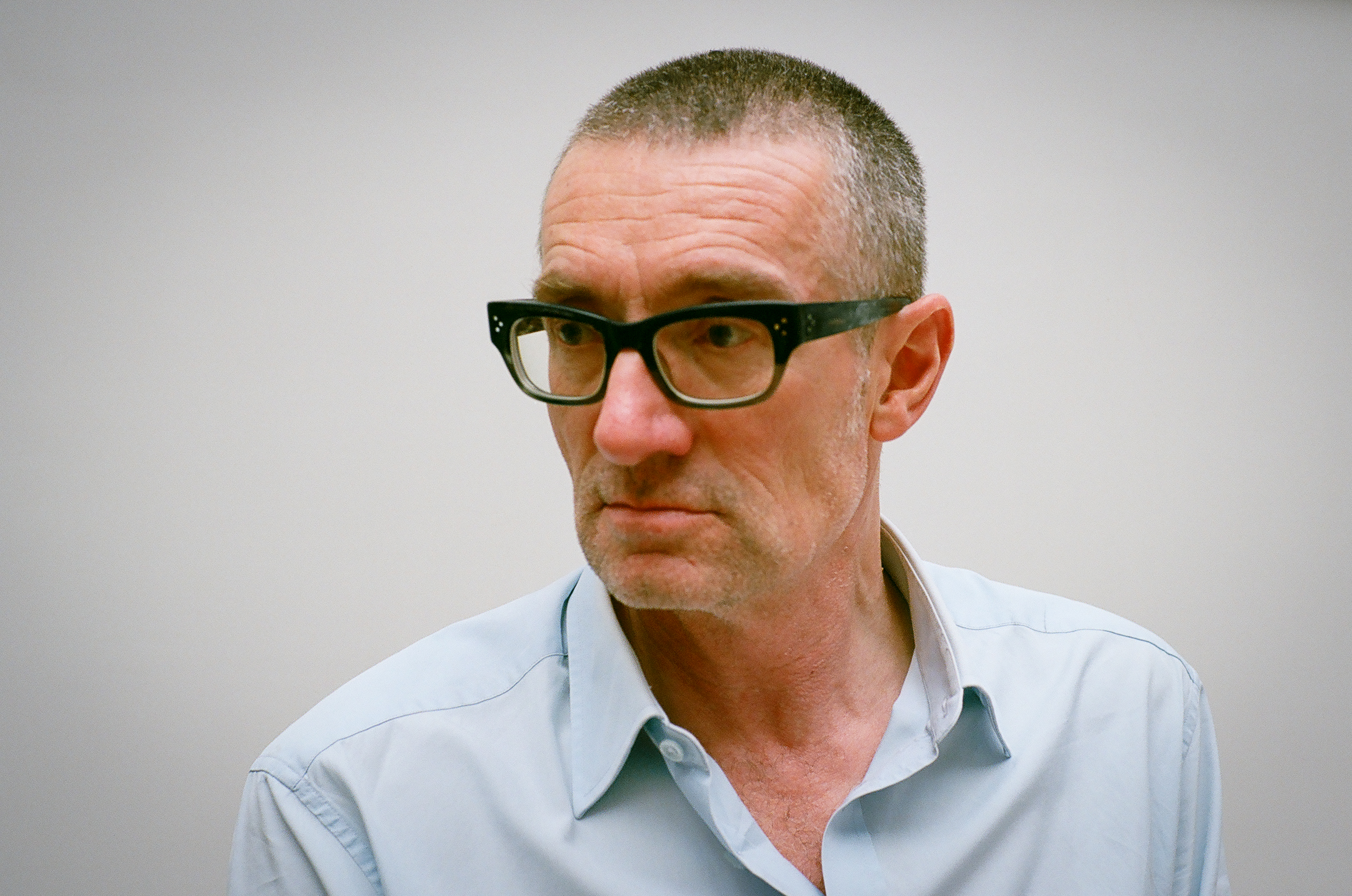 Томас Хиршхорн